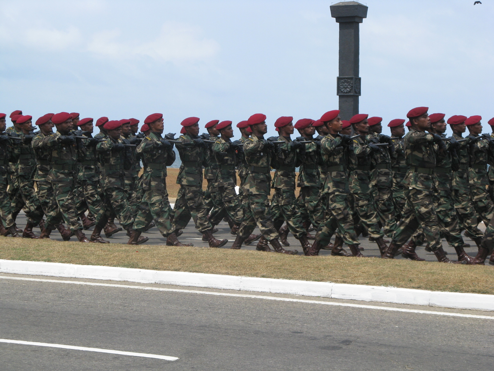 Sri Lanka Army